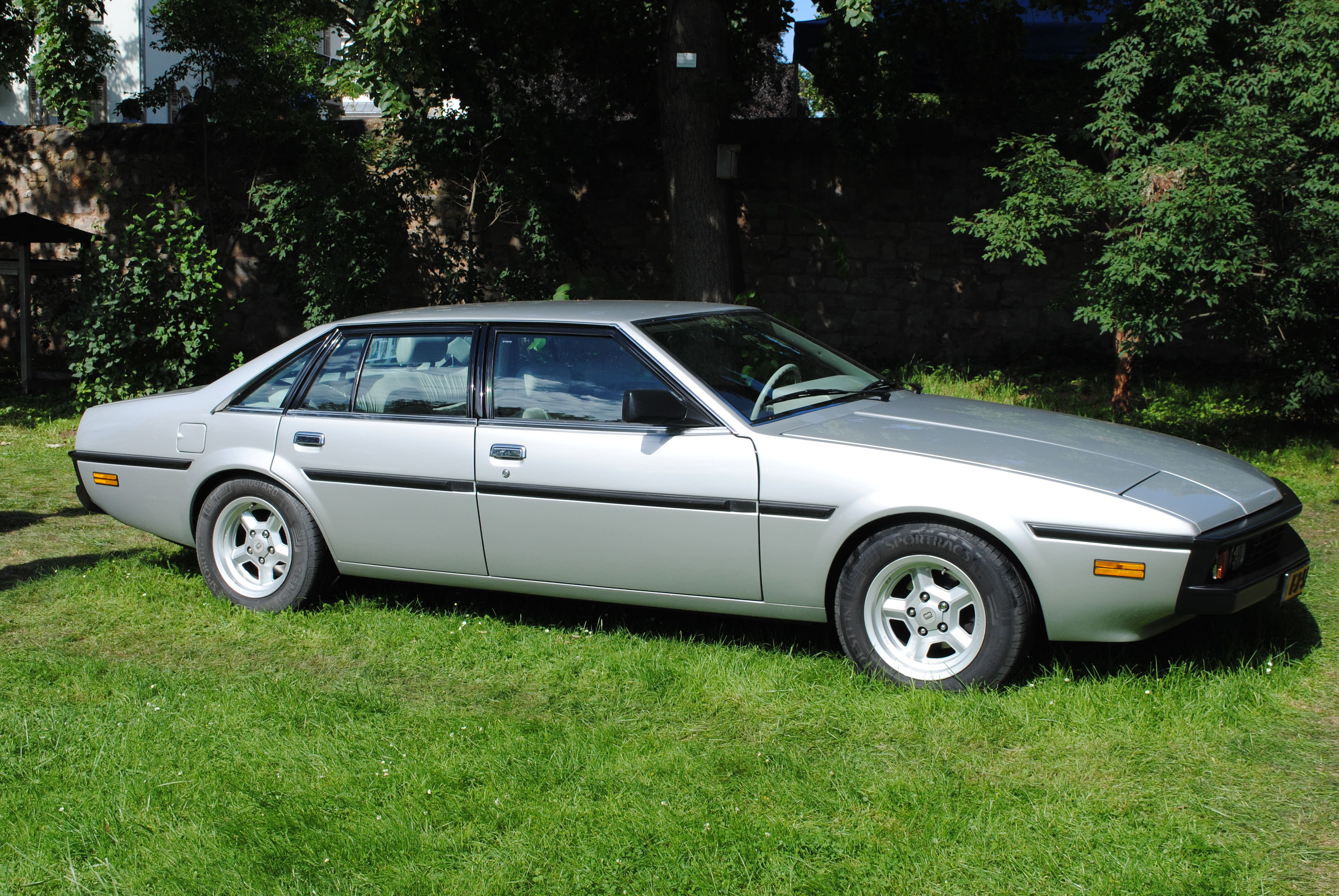 Bitter SC Sedan auf dem Klassikertreffen Rüsselsheim 2016.